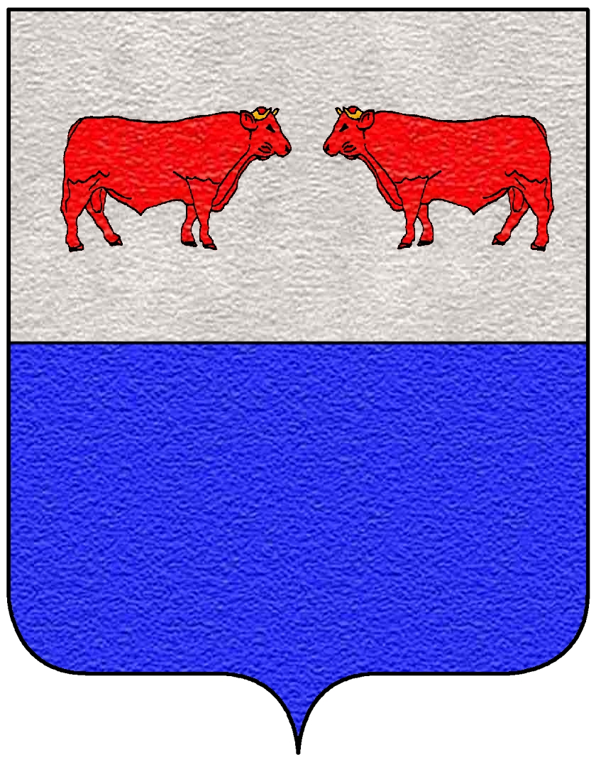 Stemma della famiglia Buzignola